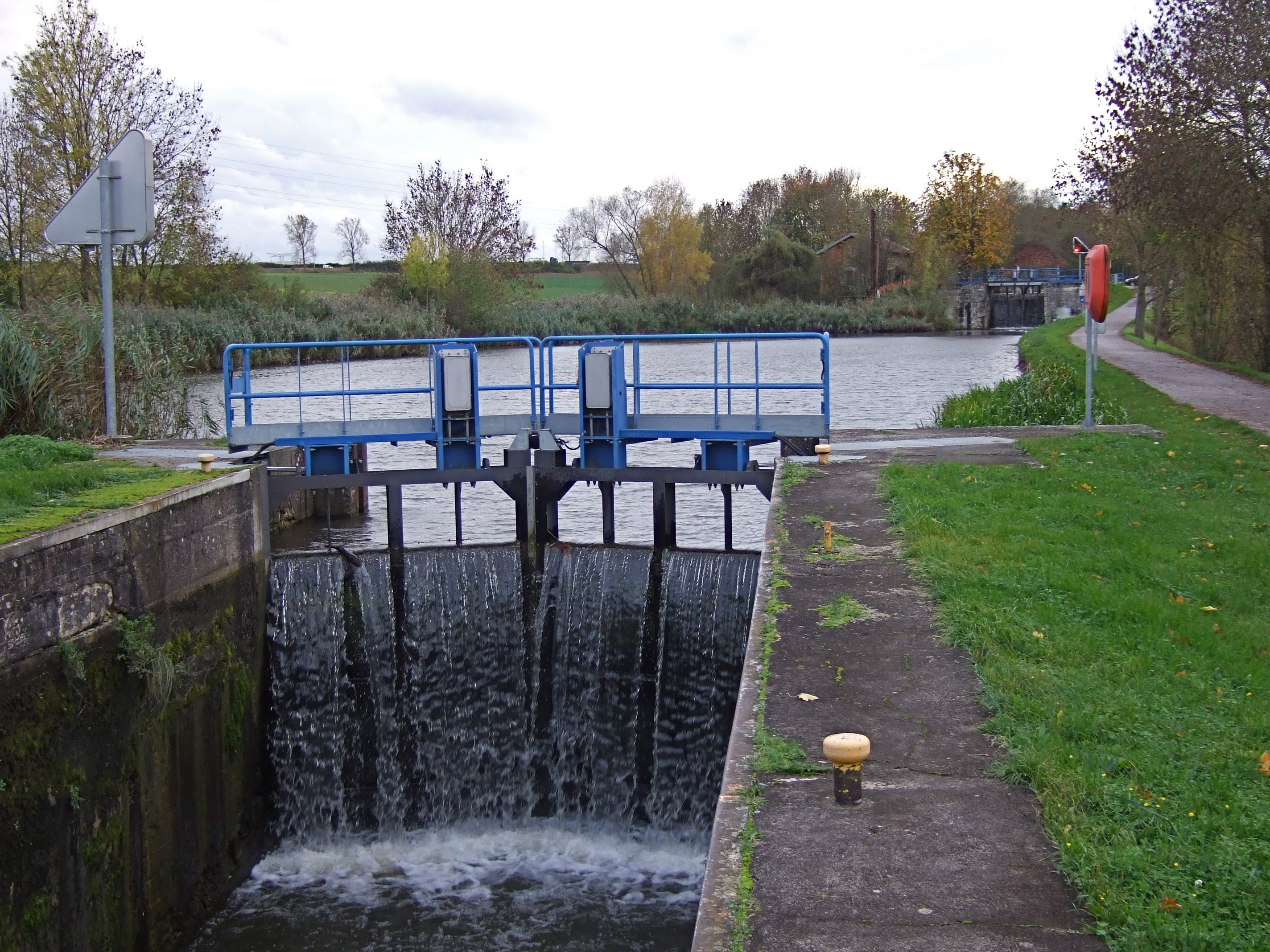 Canal de jonction de Nancy - Chaîne d'écluses